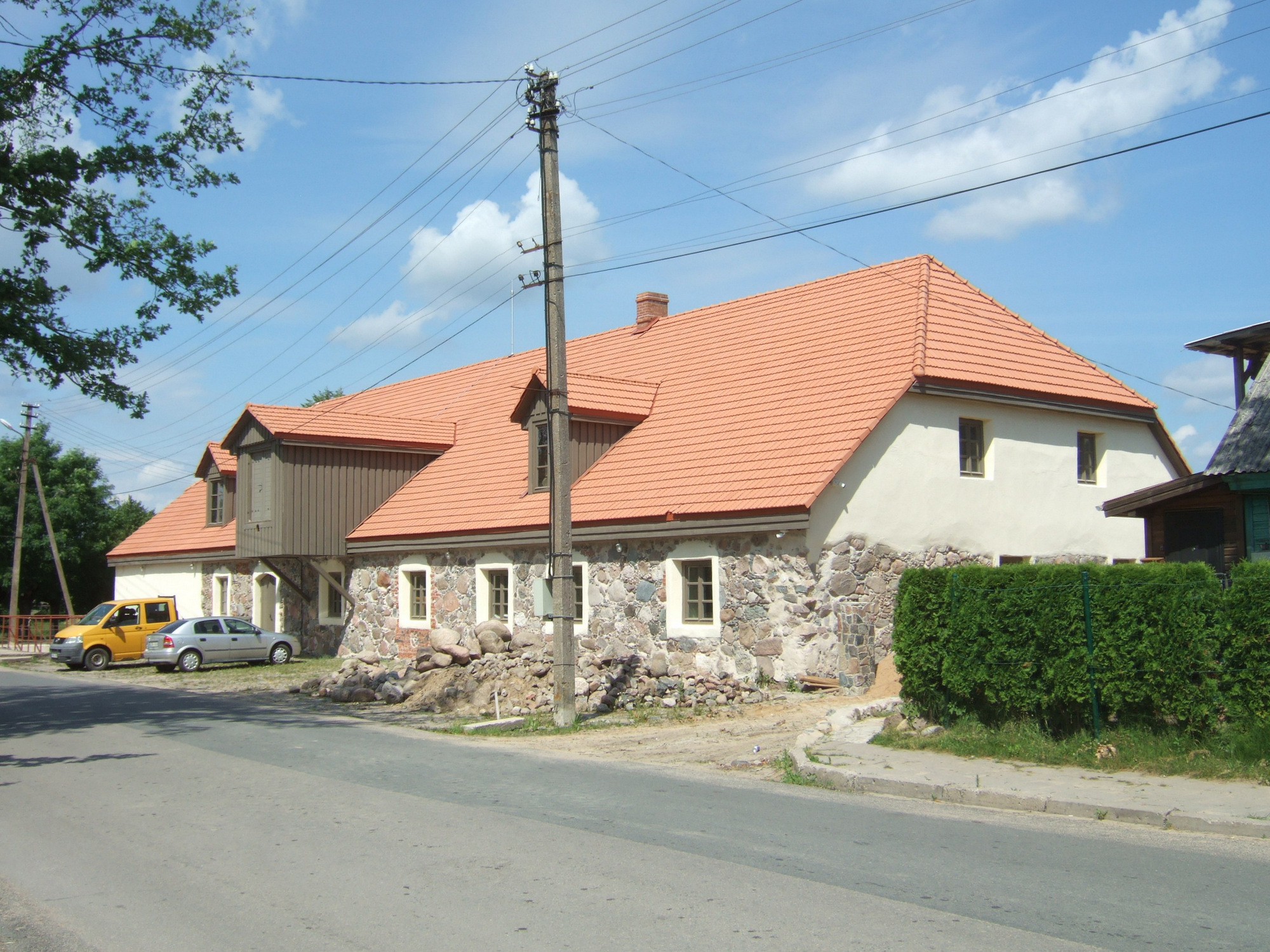 Sedos malūnas